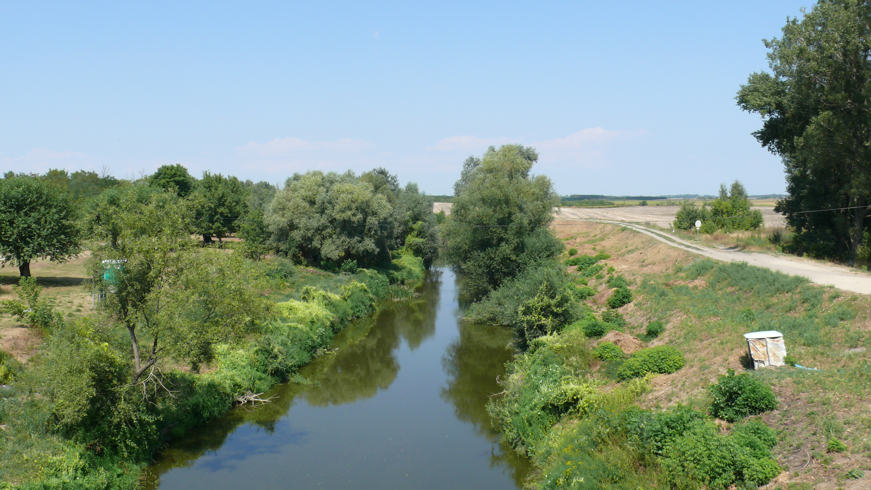 sió, pálfa